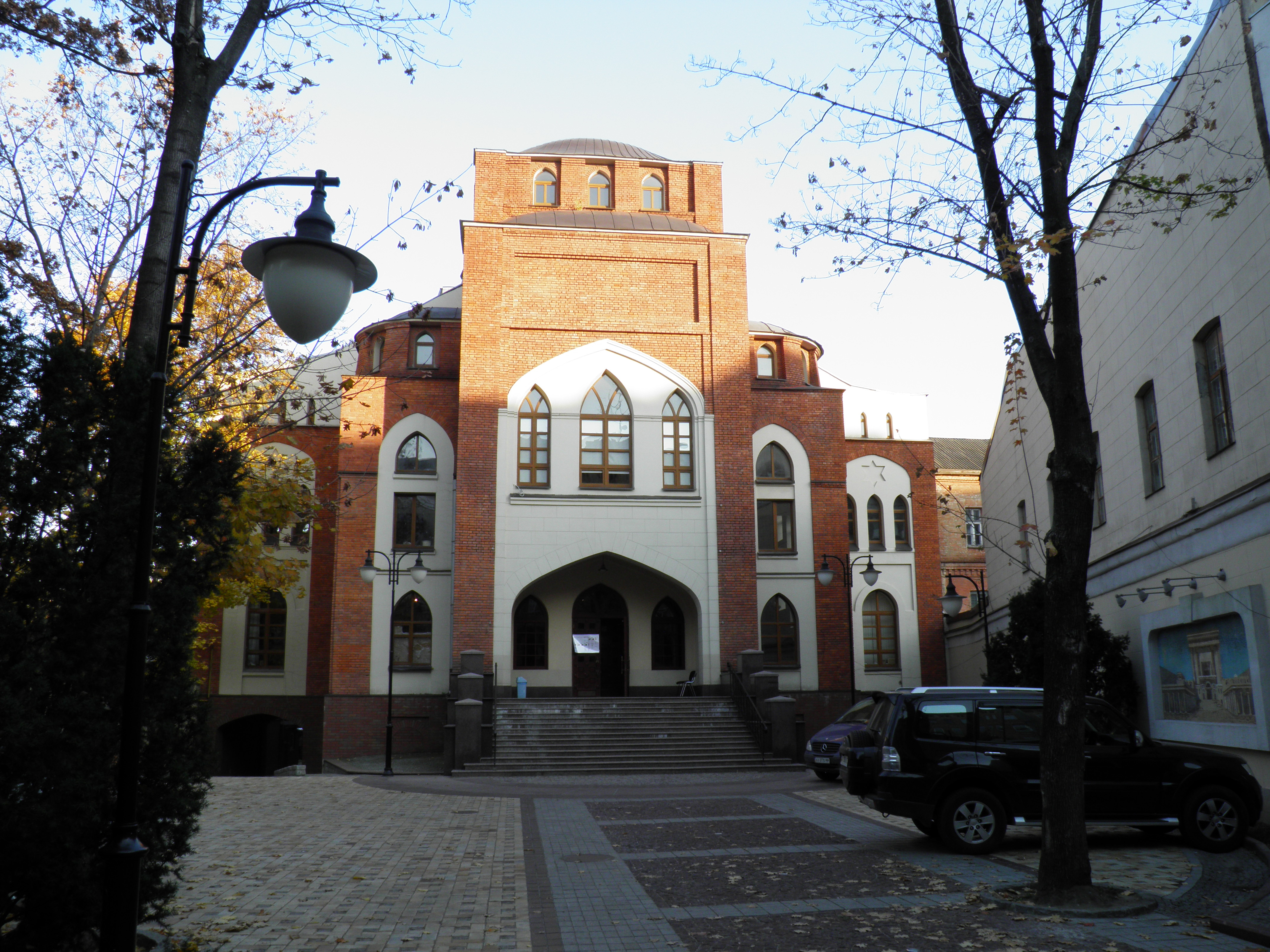 Синагога, Харків, вул. Пушкінська, 12